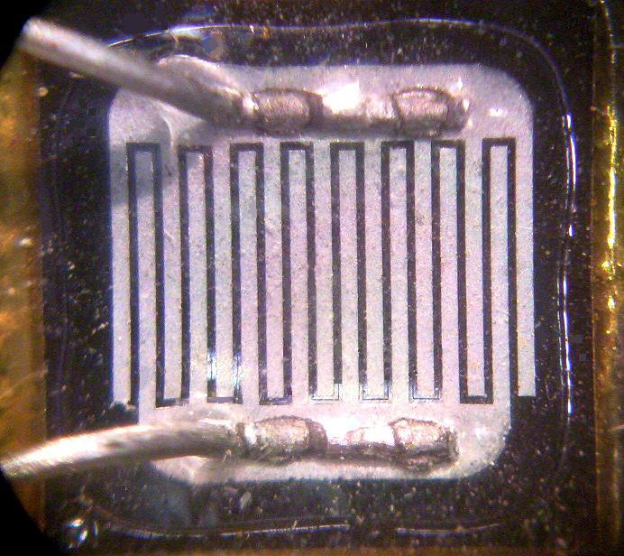 Bipolarer Leistungstransistor, Chip-Fläche ca. 4,5 x 4,5 mm, Basis oben, Emitter unten, Kollektoranschluss durch Montage (Löten) der Chiprückseite an das Gehäuse